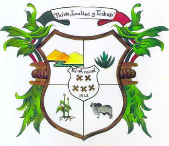 escudo del municipio de El Arenal Jalisco